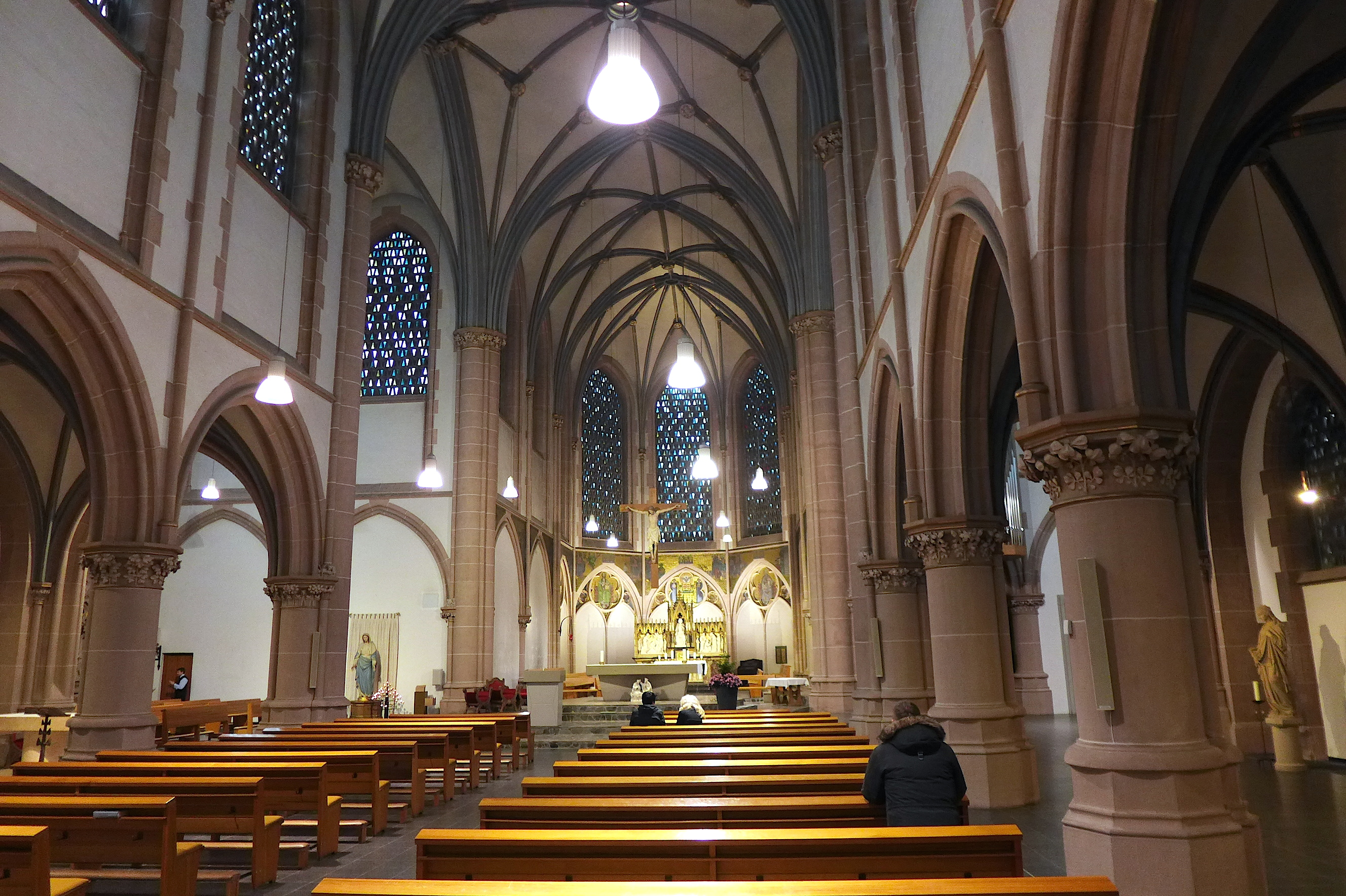 Церковь Непорочного Зачатия Девы Марии (Дюссельдорф).